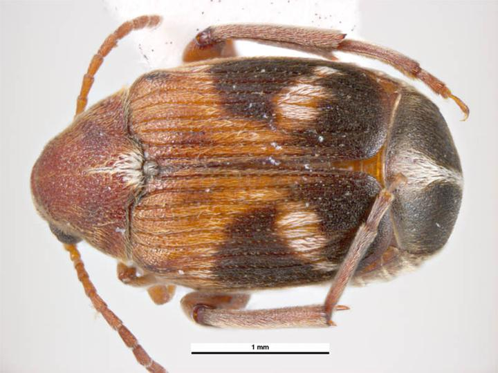 Callosobruchus maculatus, dorsal view. Location: Indonesia.